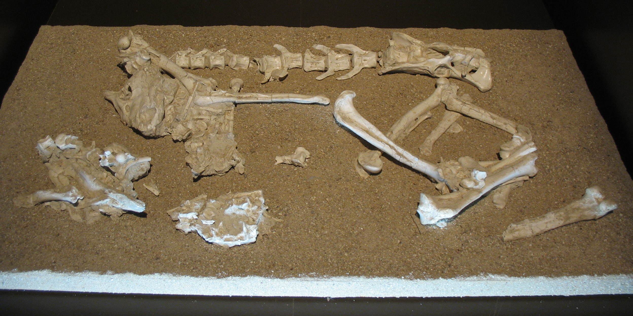 Machairodus aphanistus, cráneo y esqueleto parcial. Yacimiento de Batallones 1 (Cerro de los Batallones, Torrejón de Velasco, Madrid, España), del Vallesiense (Mioceno superior). Ejemplar en el Museo Arqueológico Regional de la Comunidad de Madrid (Alcalá de Henares)